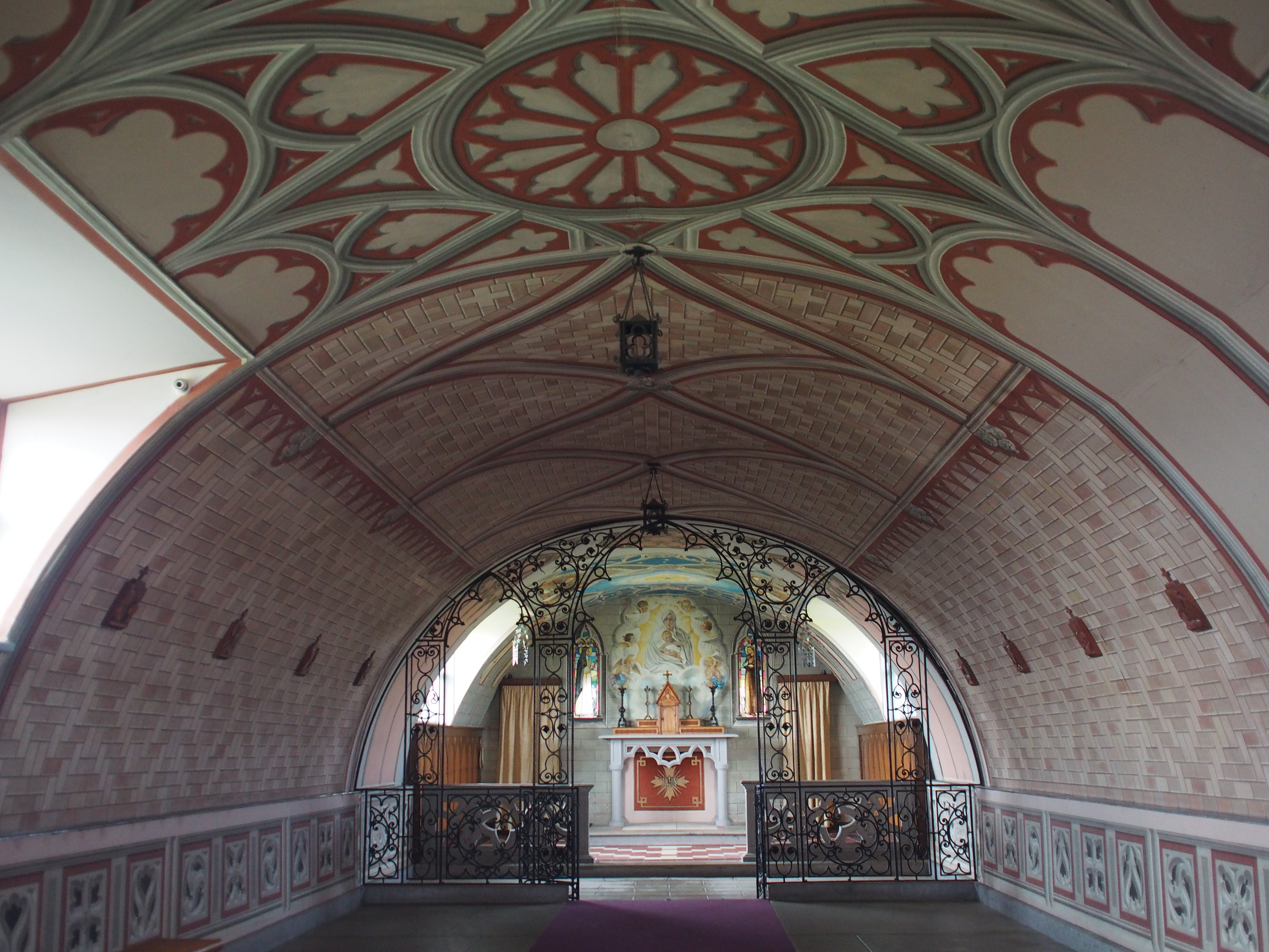 Italian Chapel